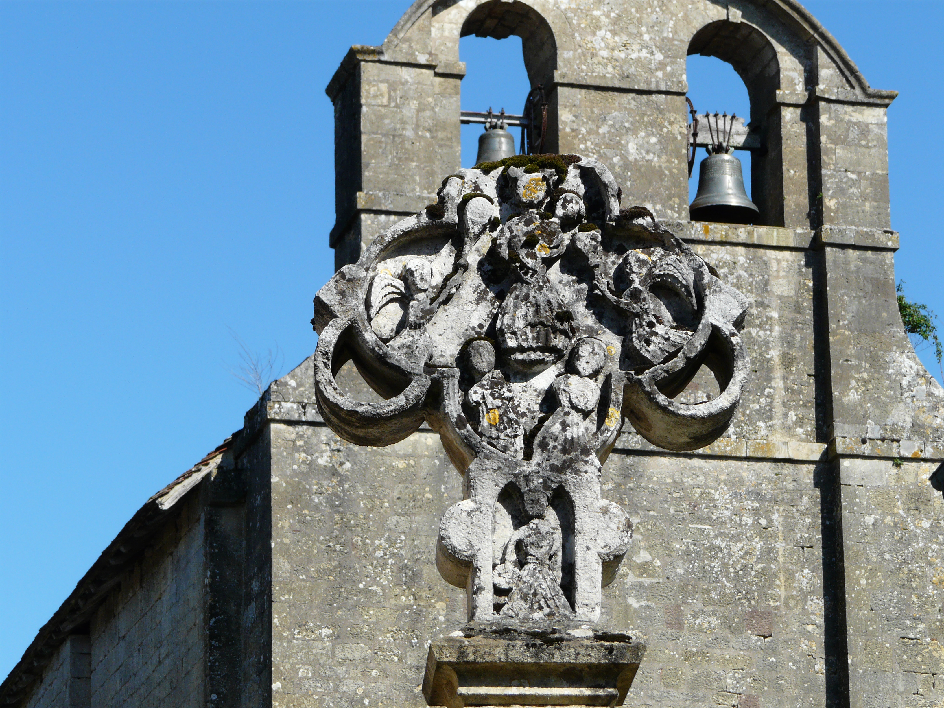 Croix sculptée devant l'église de Fanlac, Dordogne, France.